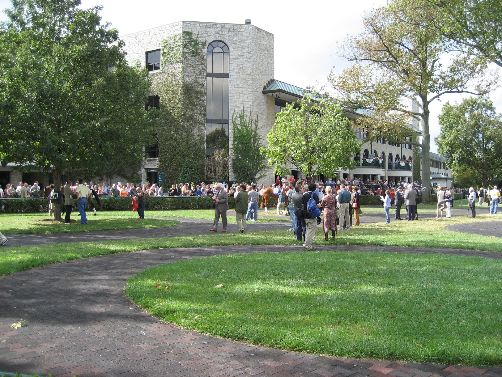 more inside keeneland